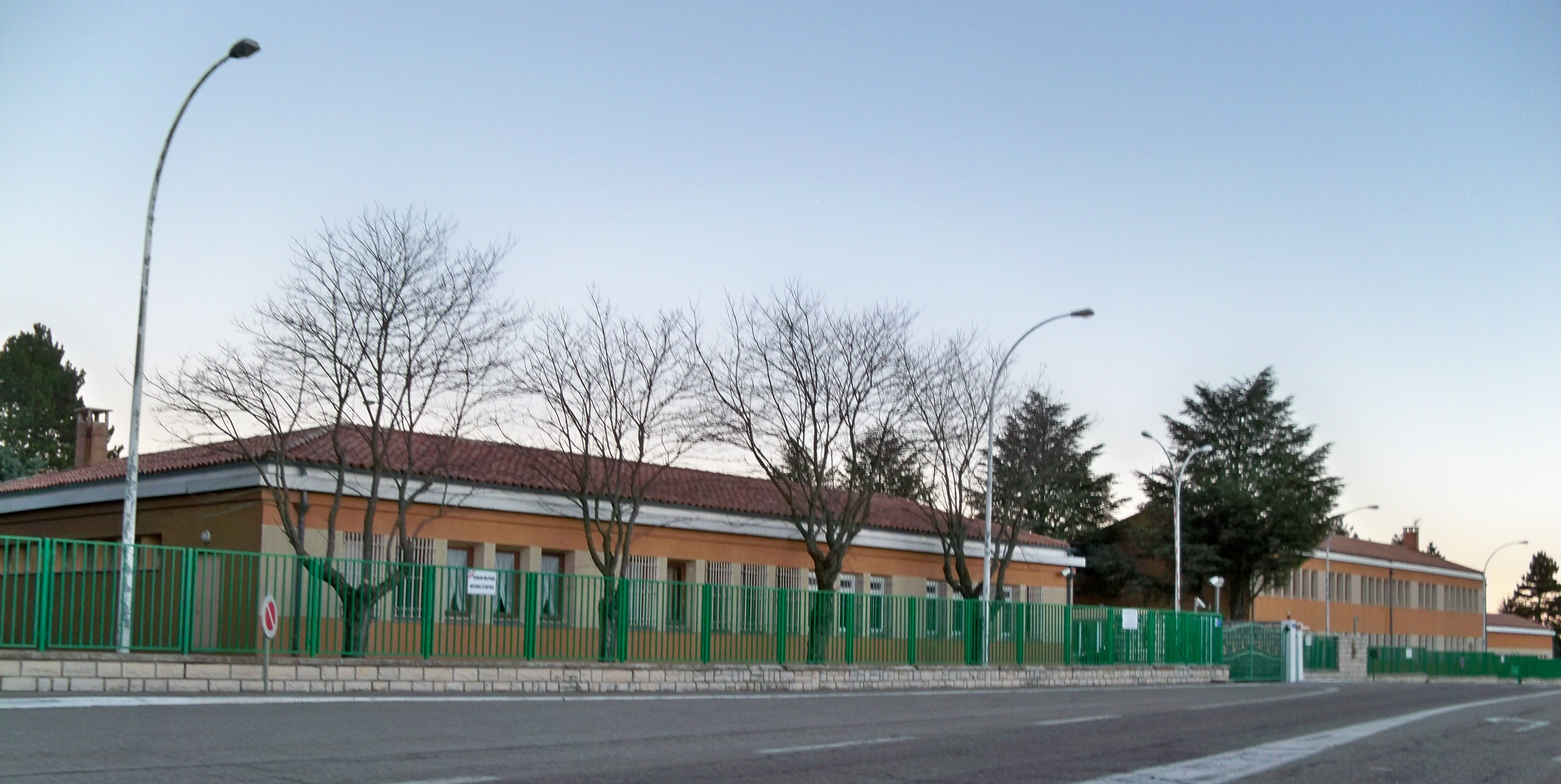 Caserne militaire du plateau d'Albion